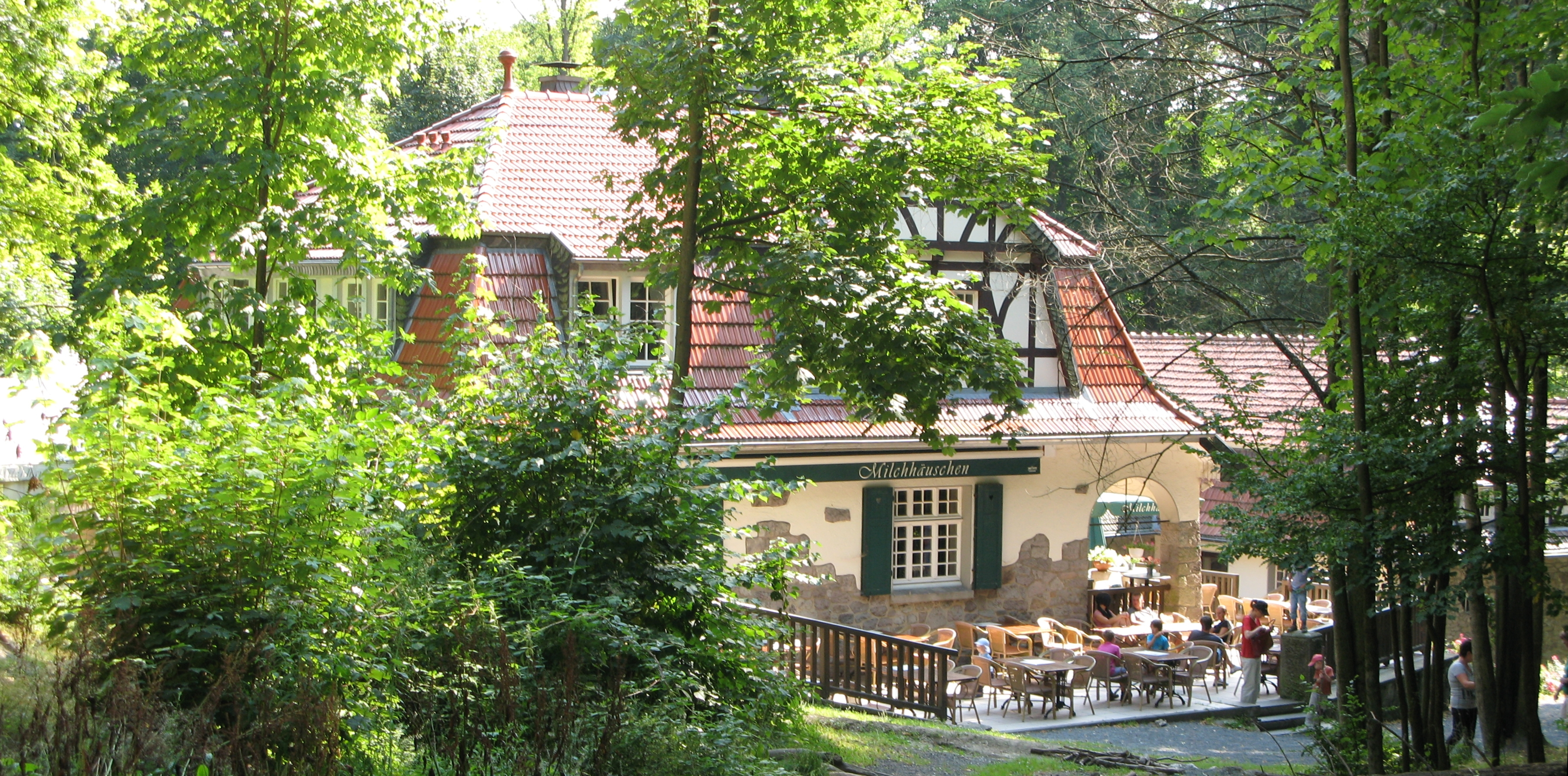 Das Ausflugslokal Milchhäuschen in der Nähe von Königswinter im Siebengebirge.